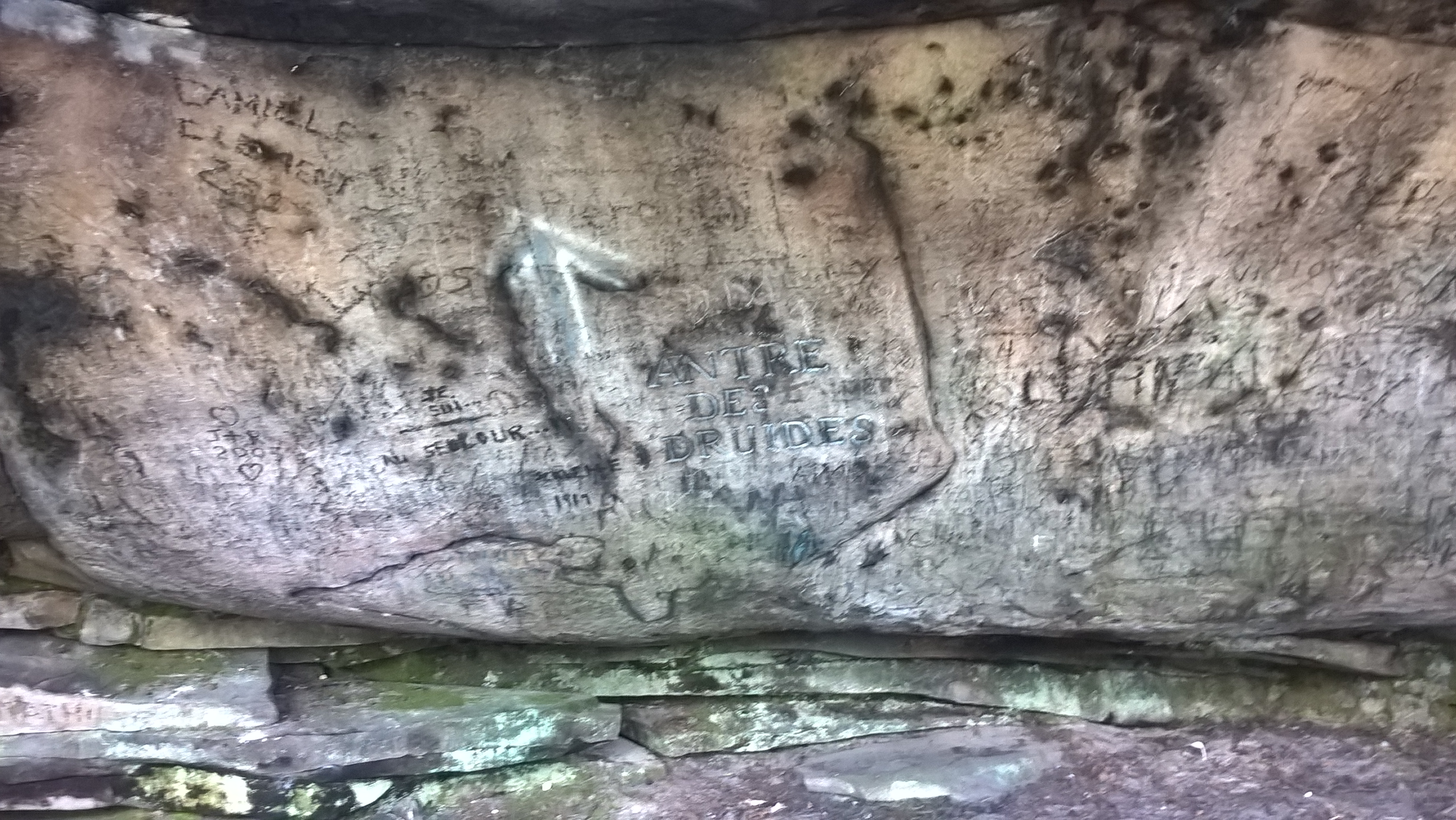 Art rupestre forêt de Fontainebleau antre des druides et autres